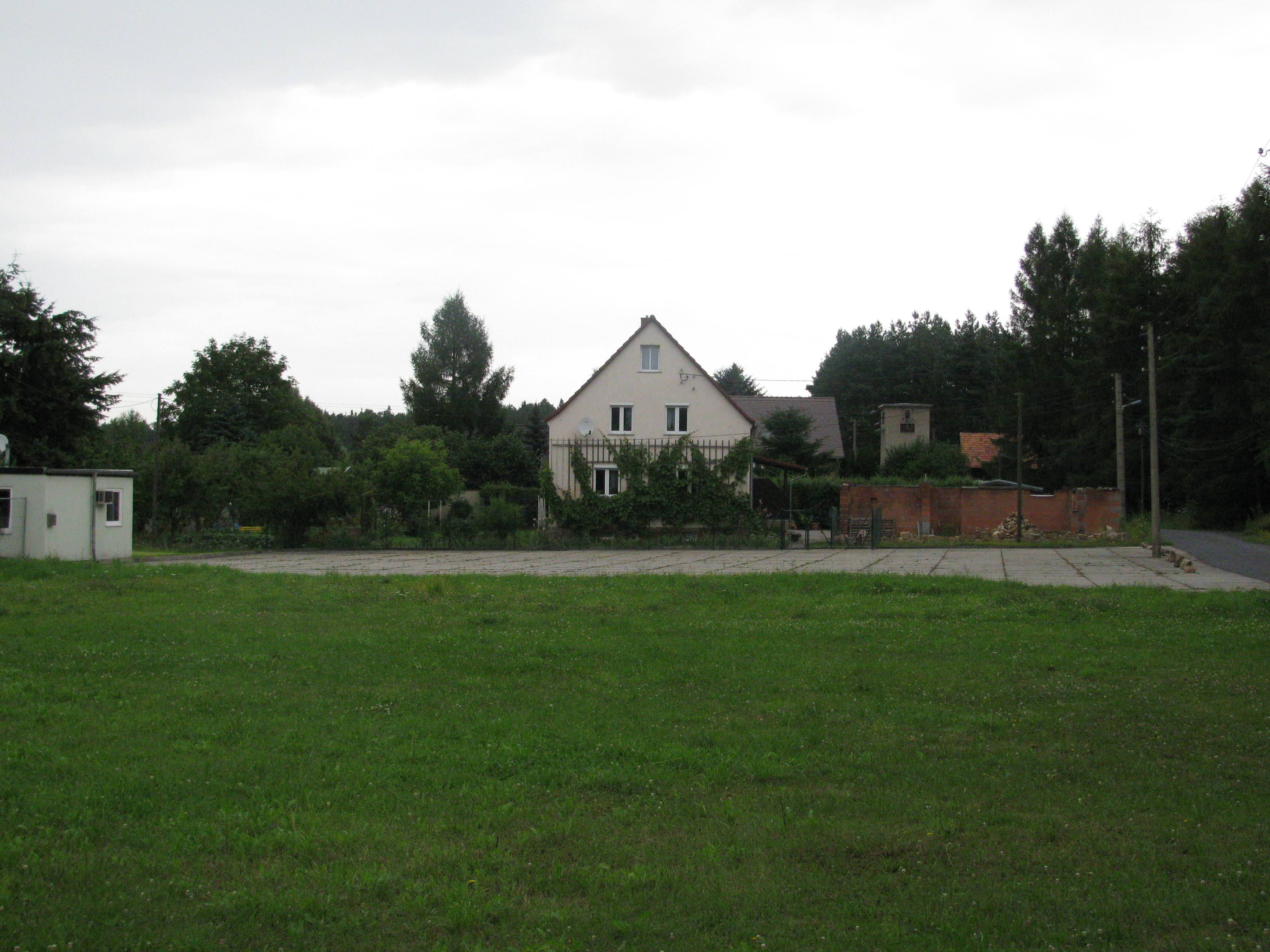 Ortseingang Neuer Anbau, Ortsteil von Weinböhla, Landkreis Meißen, Sachsen